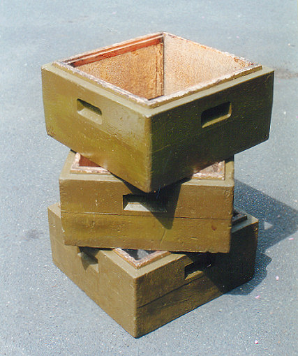 Zargen einer Magazinbeute aus Hartstyropor (Segeberger Beute)